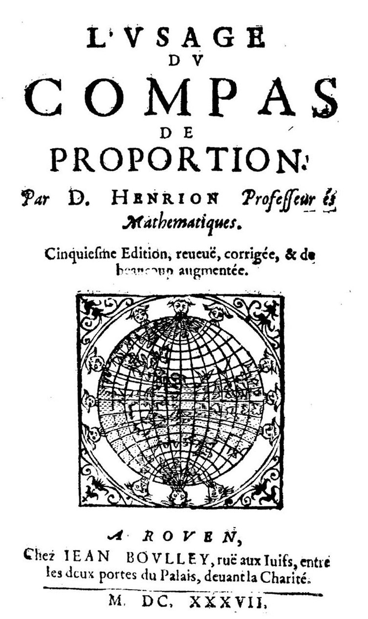 L' vsage du compas de proportion. Par D. Henrion professeur es [sic] mathematiques. - A Rouen : chez Iean Boulley, ruë aux Iuifs, entre les deux portes du palais, deuant la Charité, 1637. - [4], 148 p., [1] c. di tav. doppia : ill. ; 8° . Frontespizio